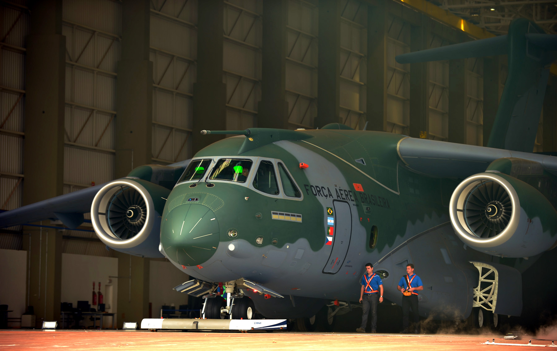 21/10/2014, Gavião Peixoto - SP Fotos: Tereza Sobreira